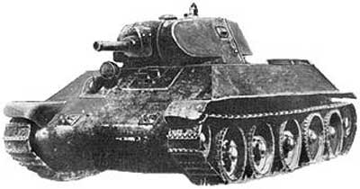 蘇聯的A-32坦克